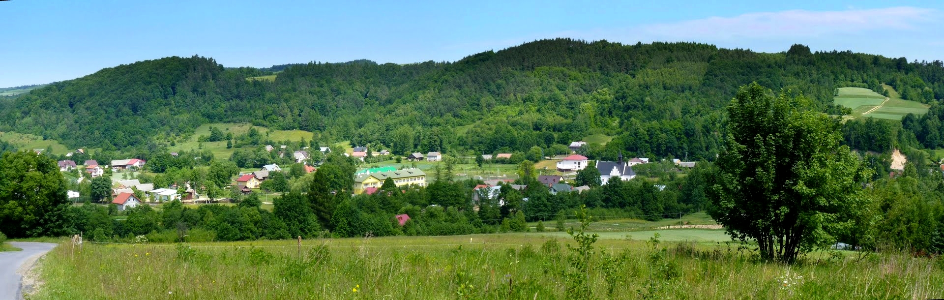 Panorama na Hłudno